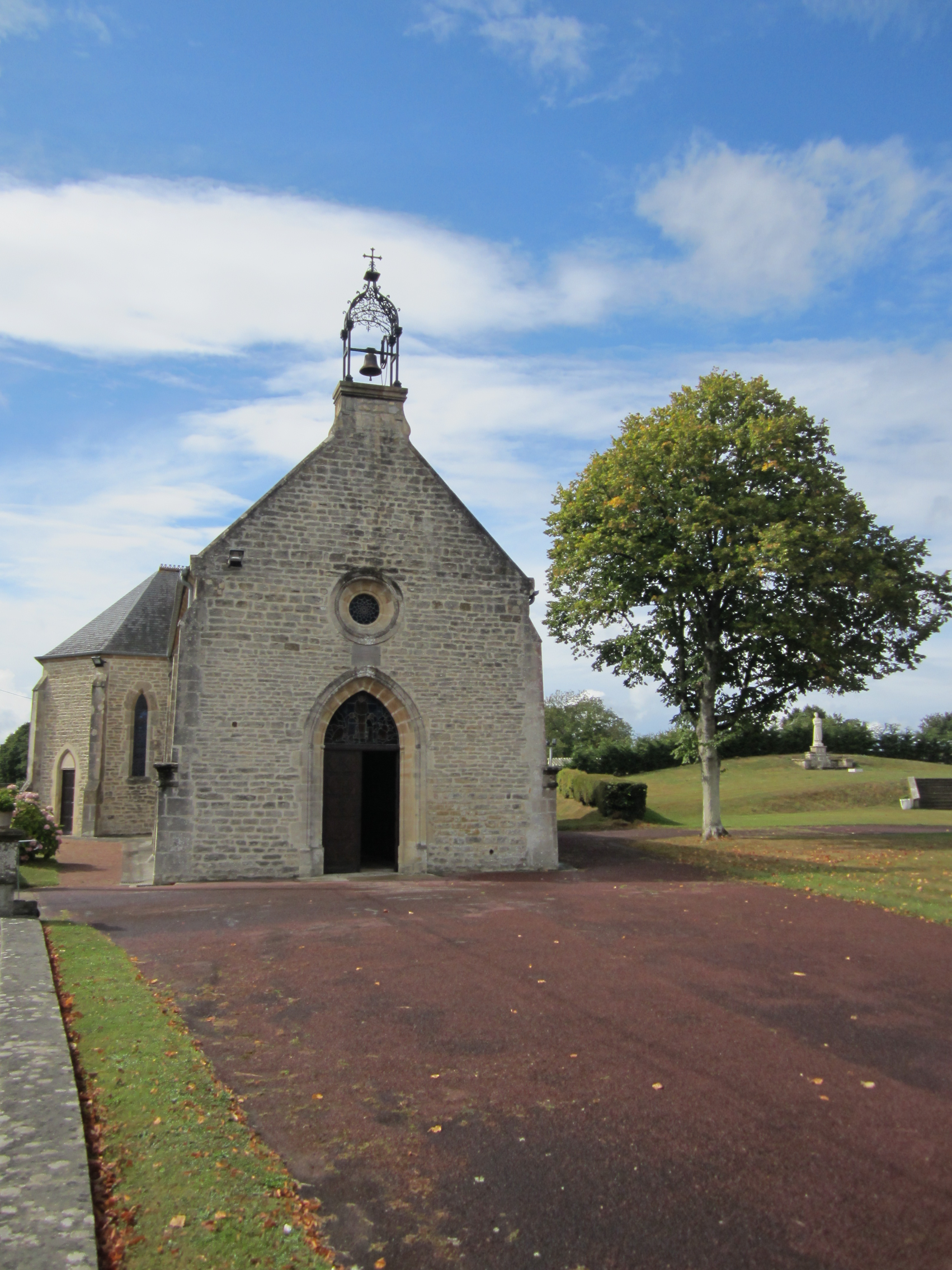 Notre-Dame de la Salette, Vindefontaine, Manche